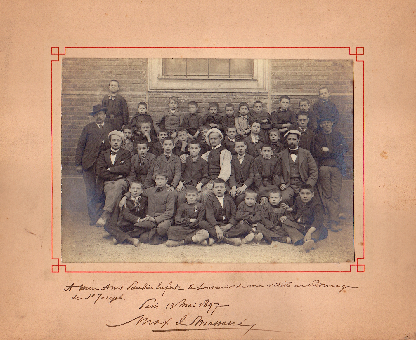 Photo de groupe du patronage Saint-Joseph de la Maison Blanche (Paris, 13e arrondissement) en 1897 - à droite, portant un béret blanc, Paulin Enfert. Photographe inconnu.